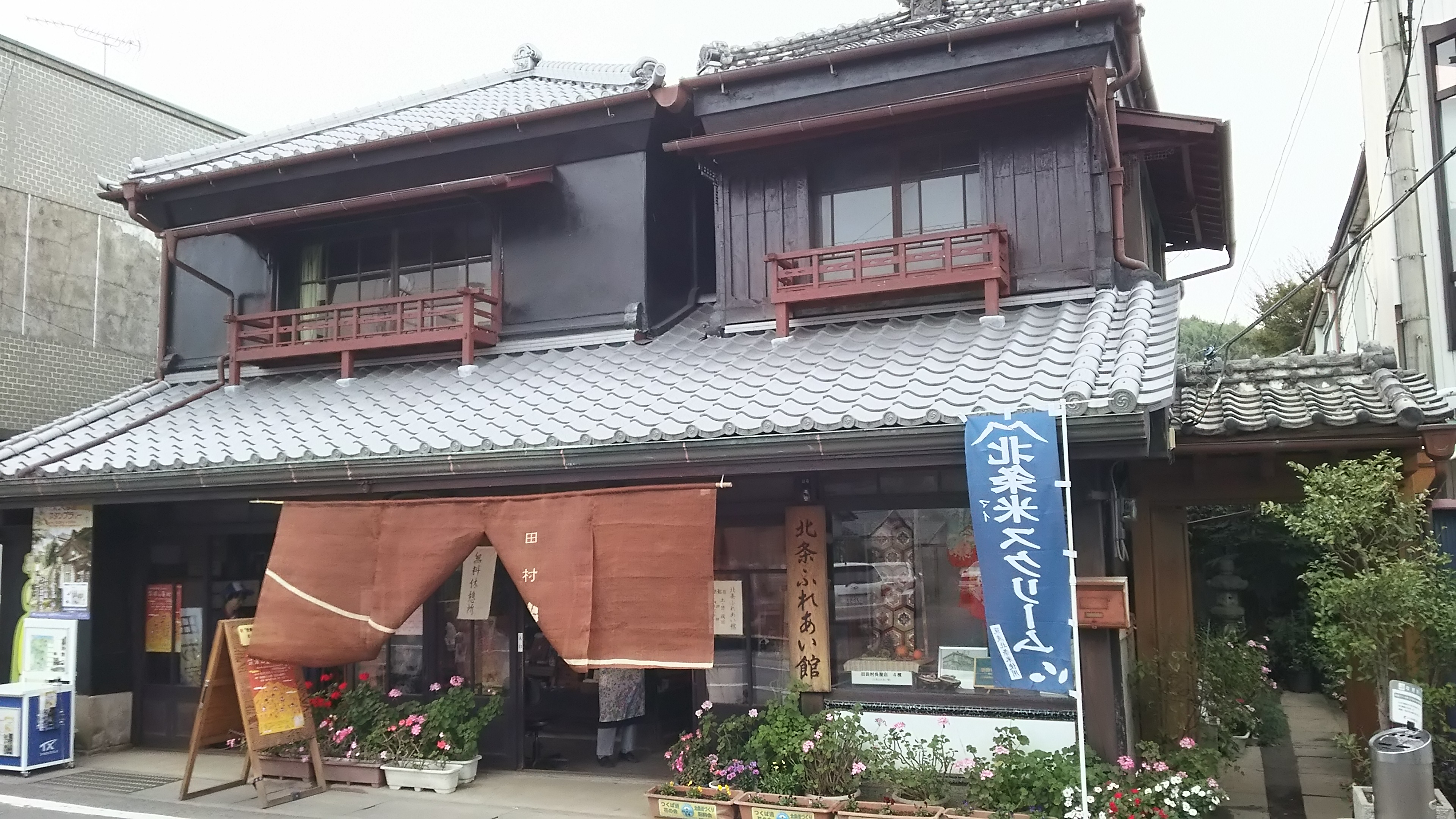 旧田村呉服店（北条ふれあい館）